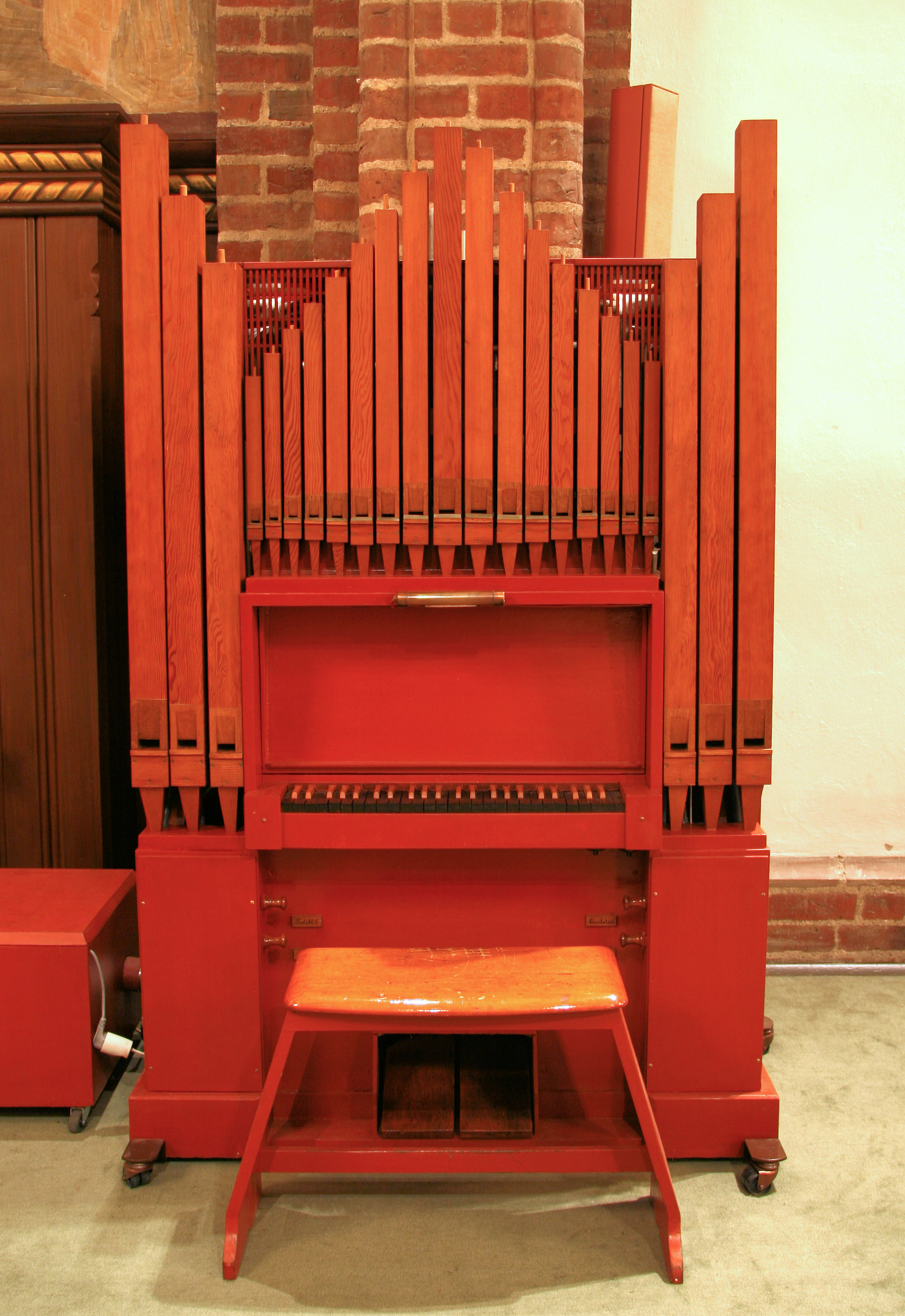 Sankt Andreas Kirke, Copenhagen, Denmark. Quire organ.